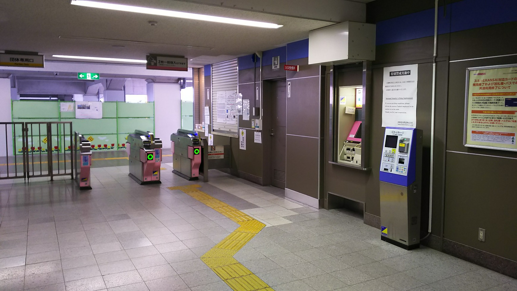 御幸辻駅改札内